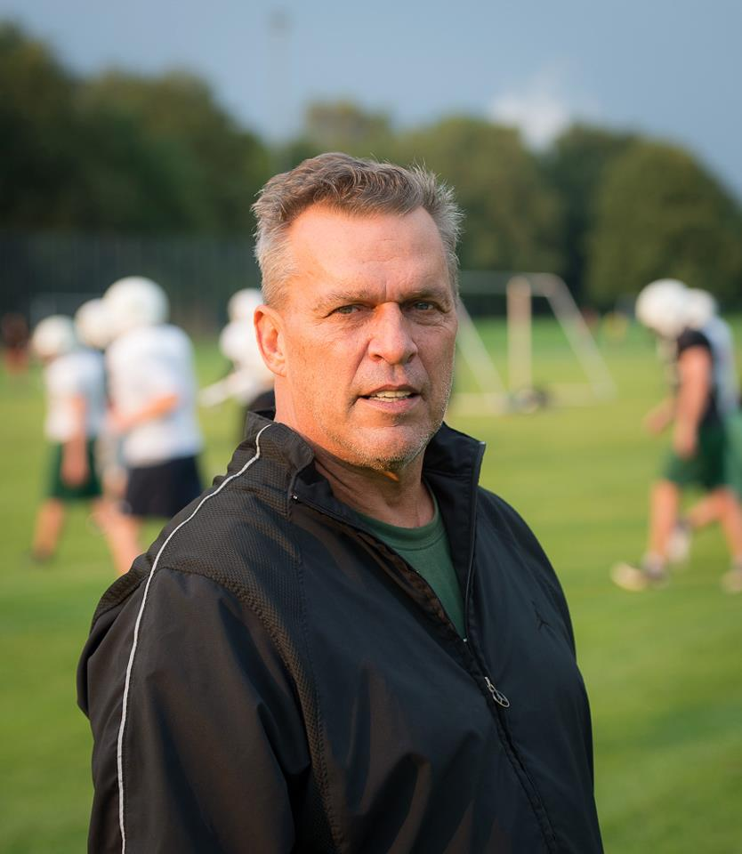 Хеффрон